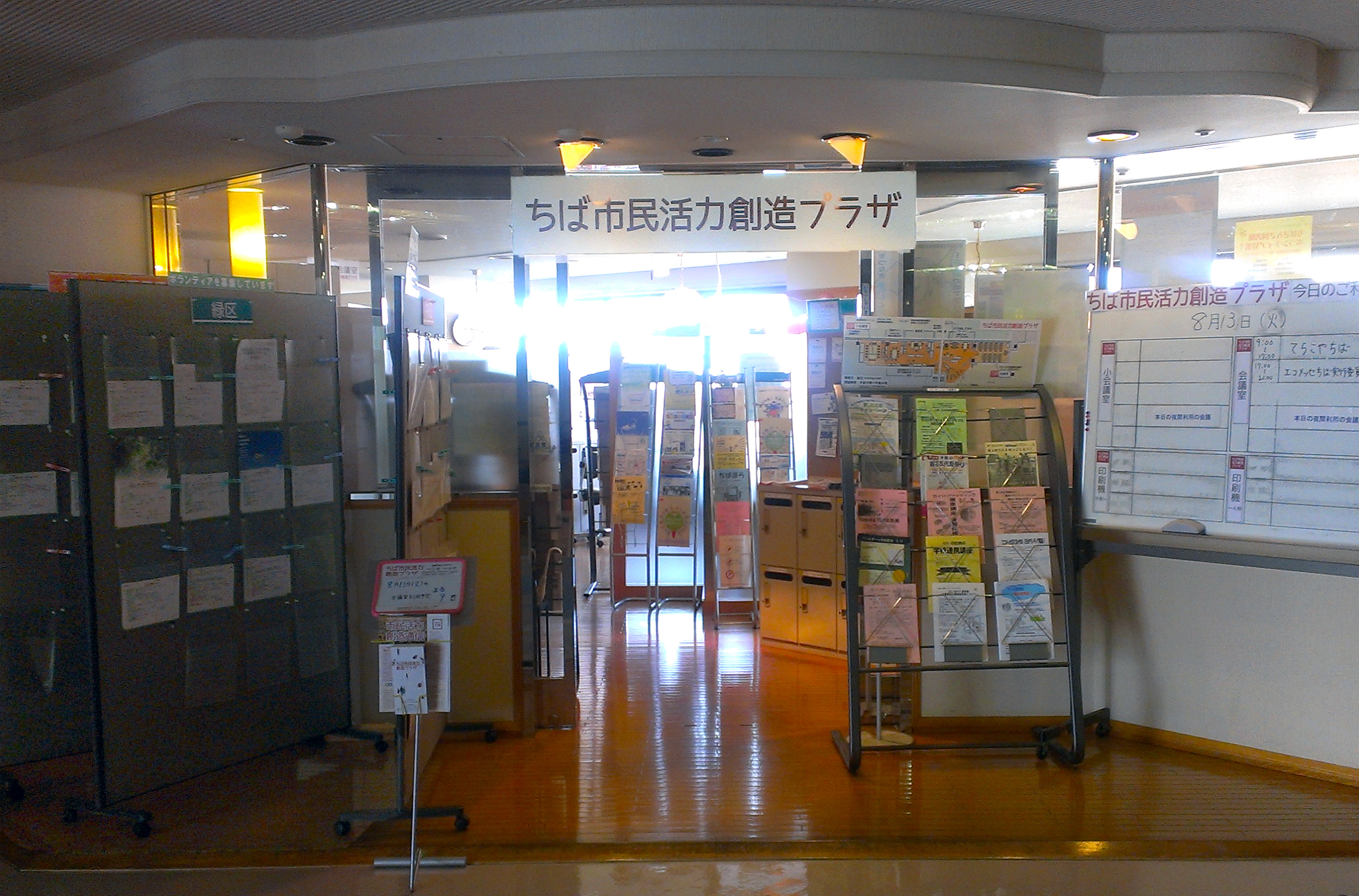 ちば市民活力創造プラザ正面